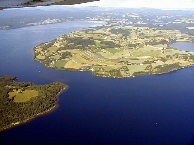 Nordfjorden (del av Tyrifjorden), Røyse, Ask og utløpet av Storelva